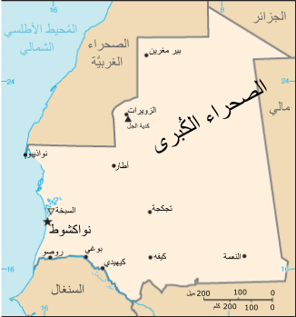 نسخة مُعرَّبة عن خريطة لِموريتانيا من إنتاج وكالة الاستخبارات المركزيَّة الأمريكيَّة.